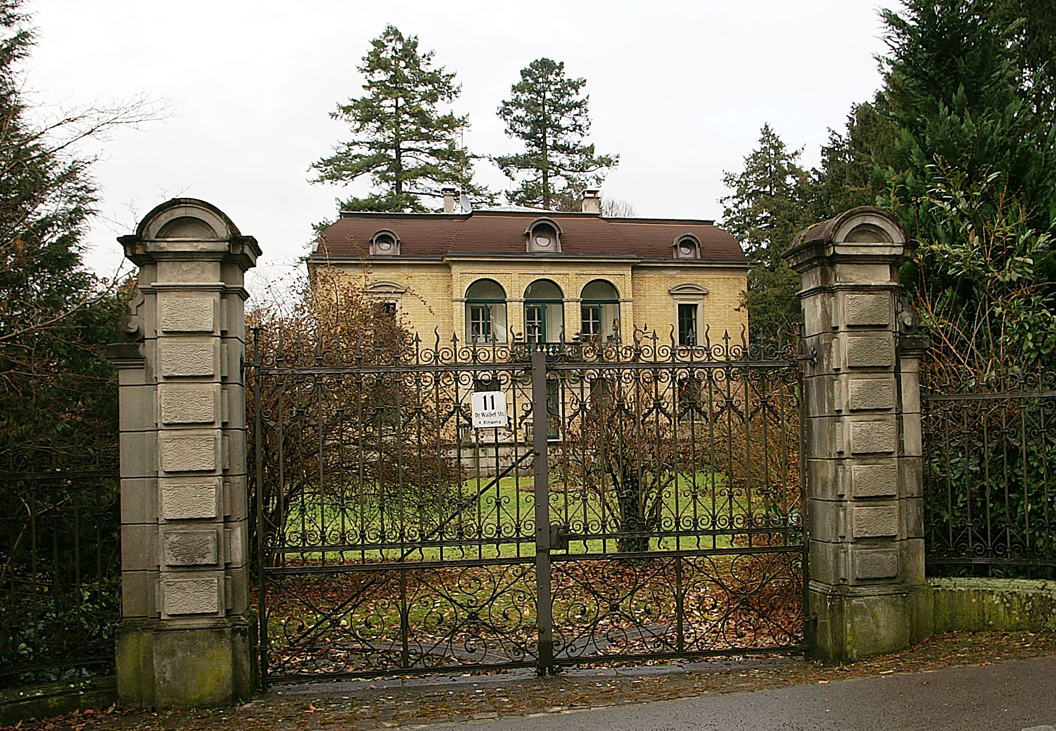 aus dem DEHIO Vorarlberg 1983: Dr.-Waibel-Strasse Nr.11: Villa, barockisierend unter französischem Einflus erbaut 1885 von dem Baumeister J.A. Albrich, in Park. Kubischer Körper, 2geschossig, Backstein, Mansarddach; seitliche Terasse aus Sandstein. In der Mitte innen atriumartige Gestaltung mit Glasdach. Eingang in der Mittelachse zurückgesetzt (Verdachung Eisen und Glas), einfache Rundbogenfenster in der Mittelachse des 1. Obergeschoss Decken mit Stuckrahmung. In Dornbirn, Oberdorf.